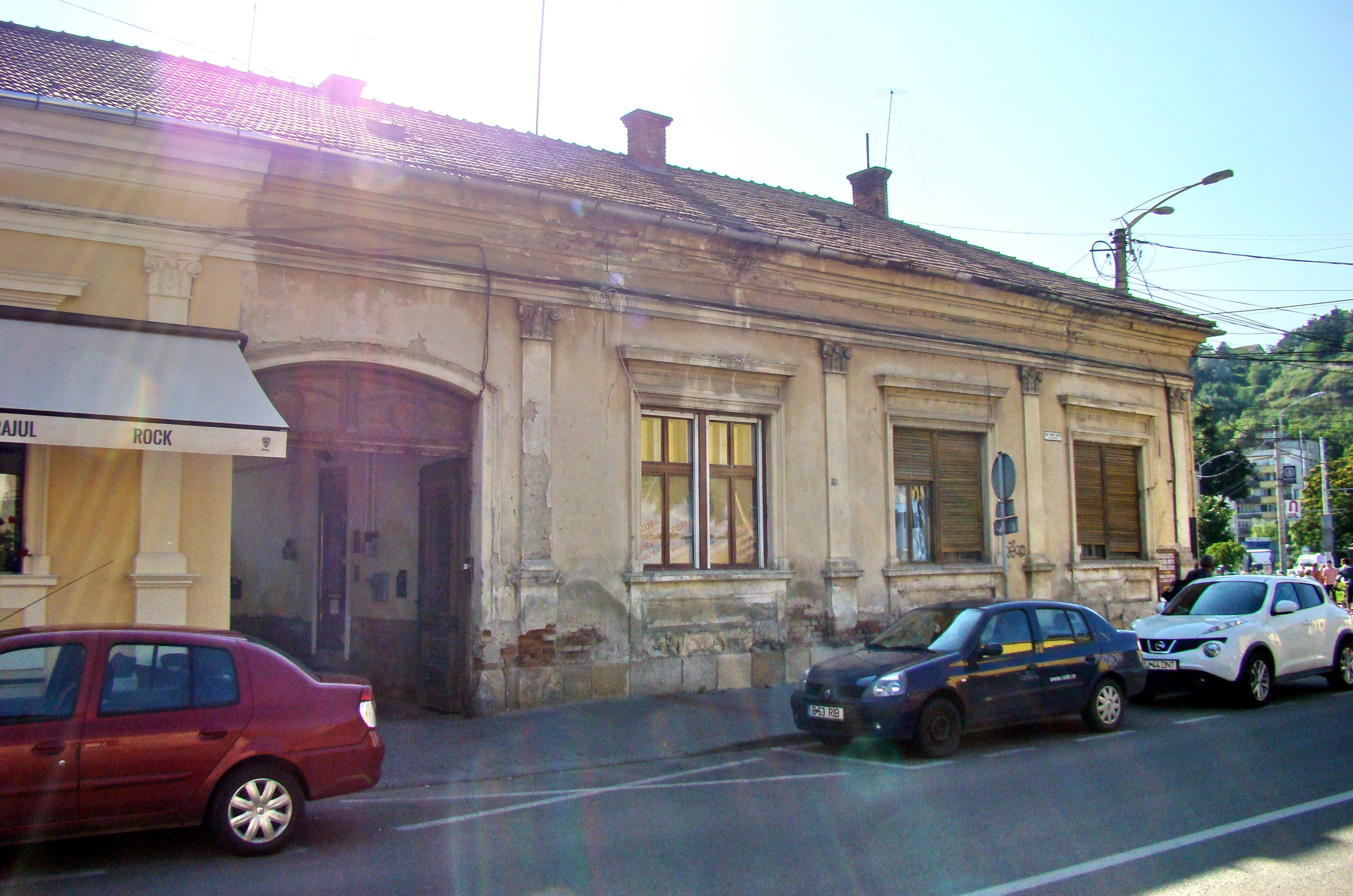 Casă monument, str.Emil Isac, nr.25